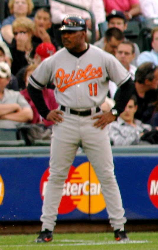 Juan Samuel